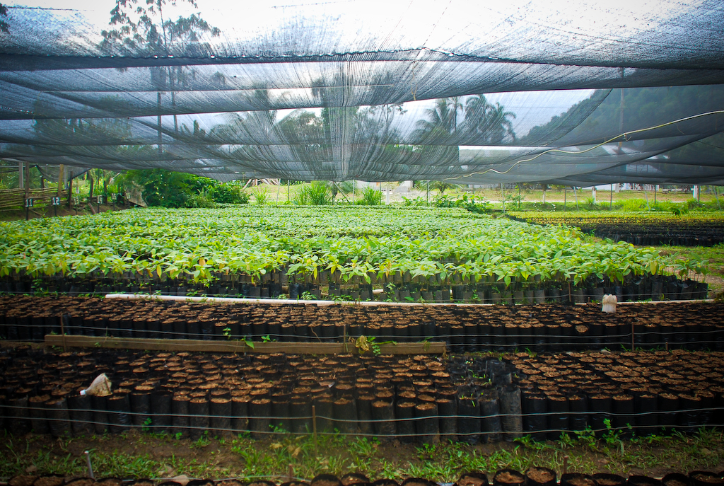 Siembra de cacao orgánico en Costa Rica.